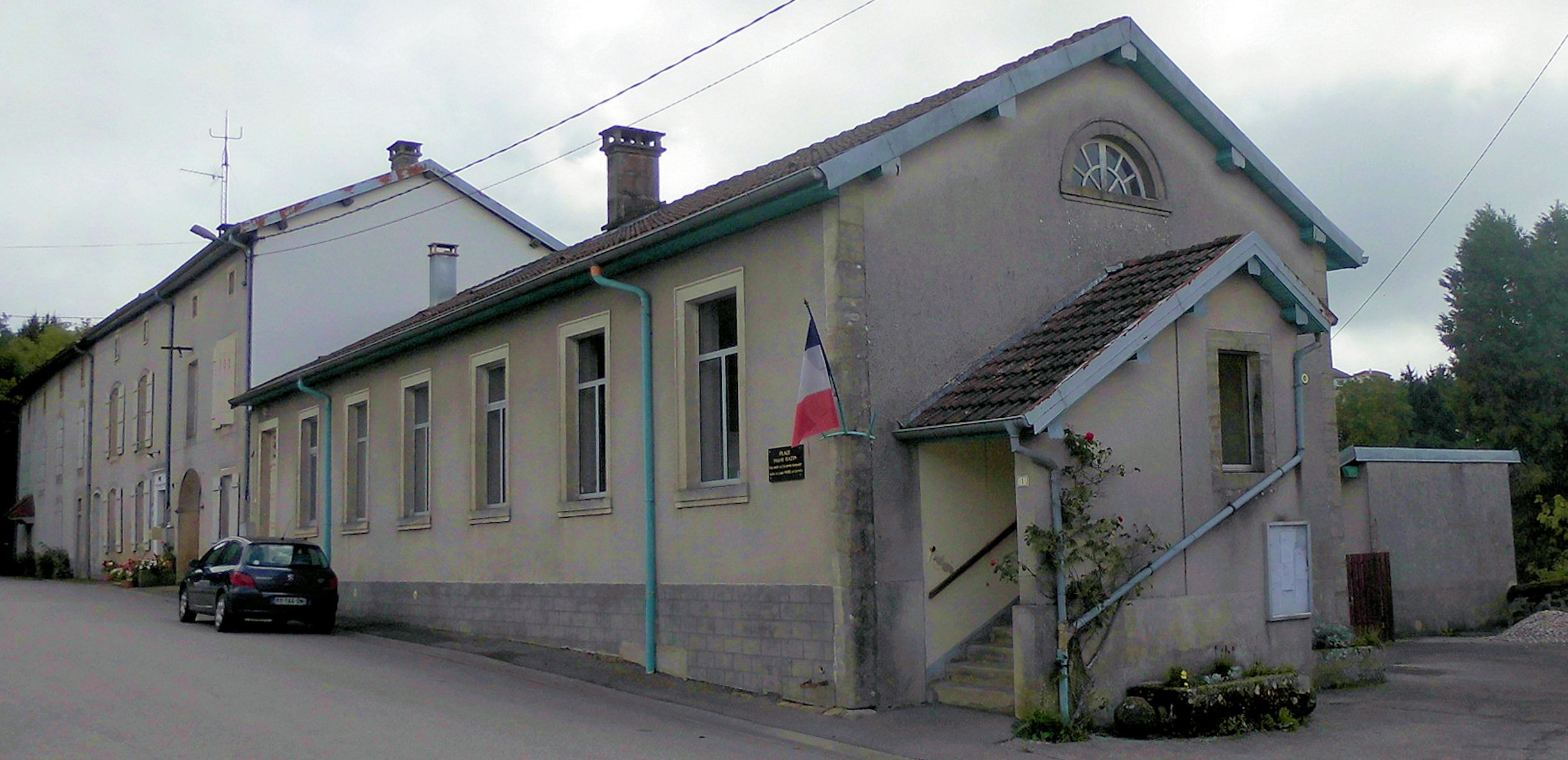 La mairie de Vioménil